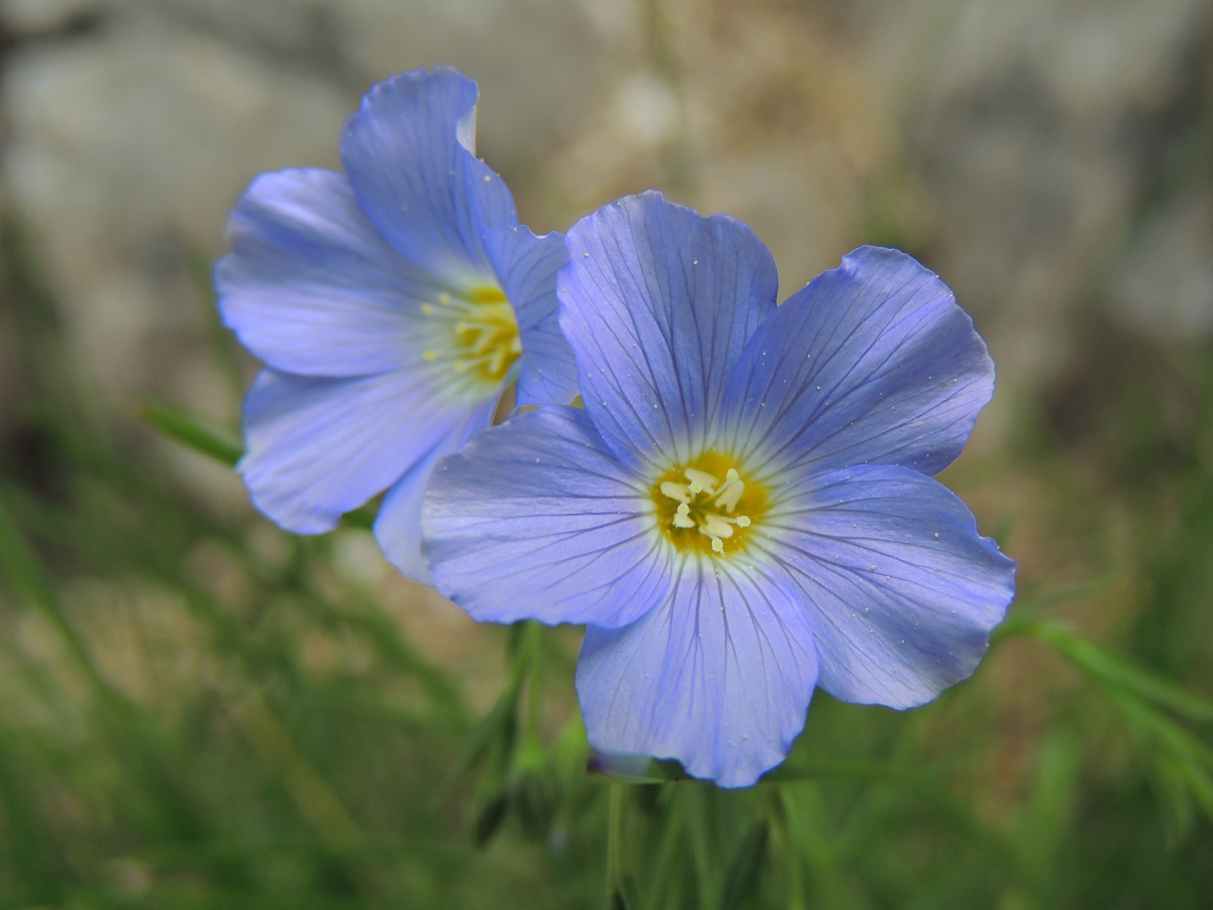 alpine flax Alpen-Lein